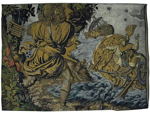 Циклоп Поліфем кидає скелю в аргонавтів, гобелен 17 ст